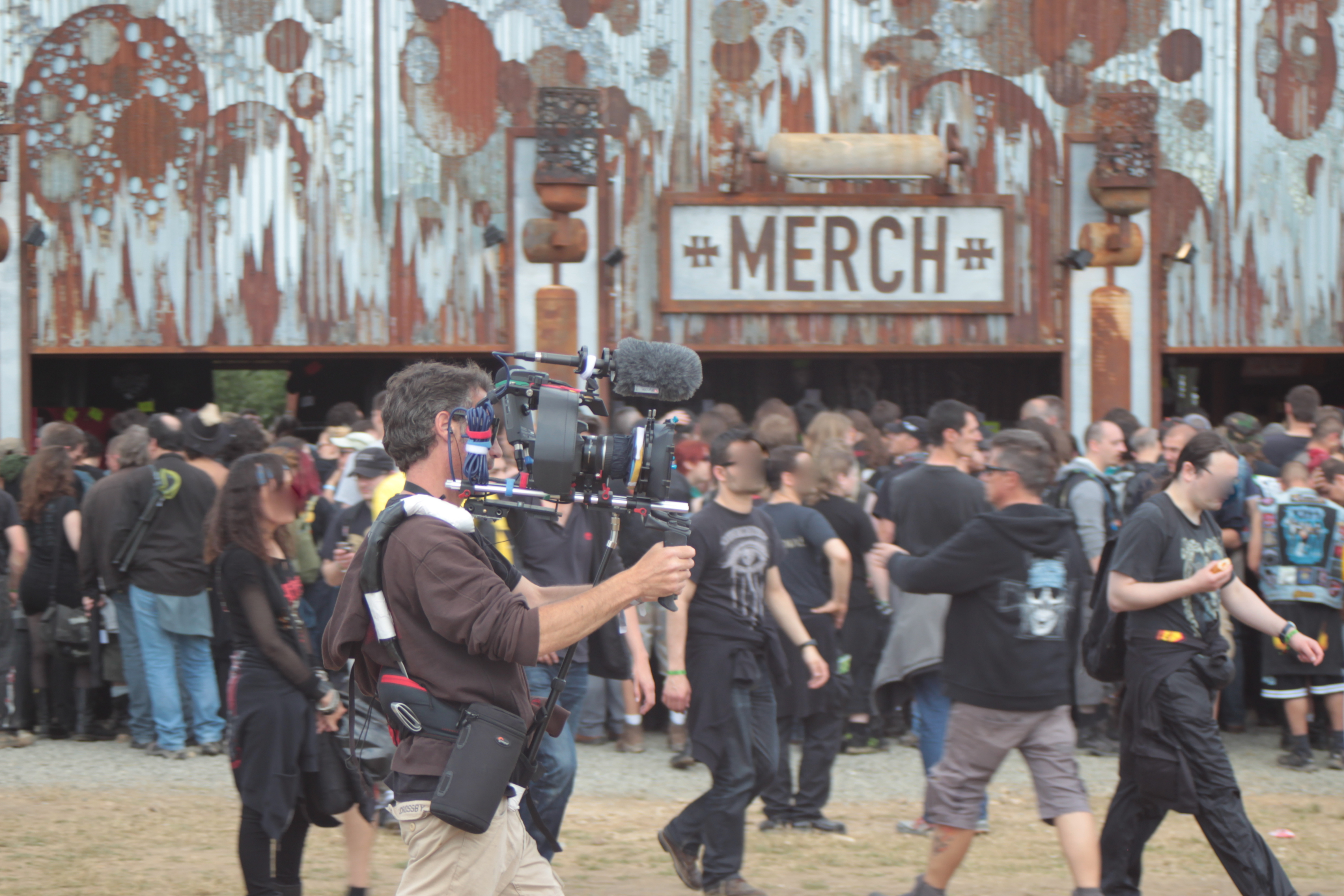 Cameraman, Hellfest 2013, Fr-44Clisson.